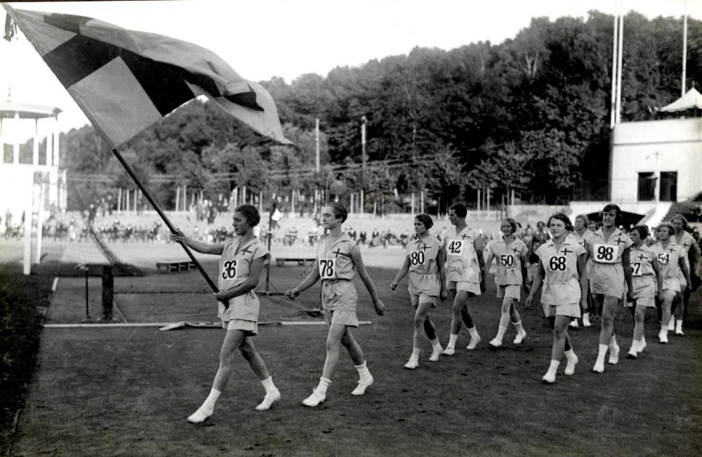 Swedish team. Andra Internationella Kvinnliga Idrottsspelen i Göteborg 1926.